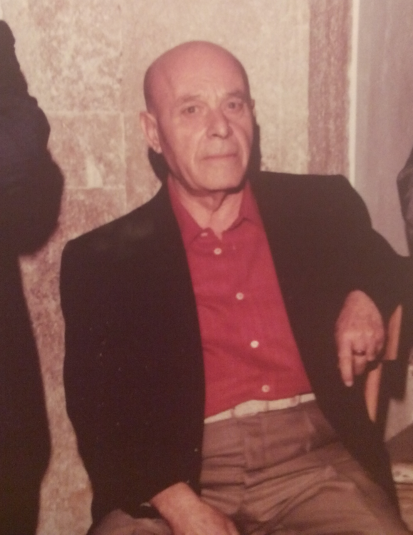 Domenico Cantatore, pittore italiano